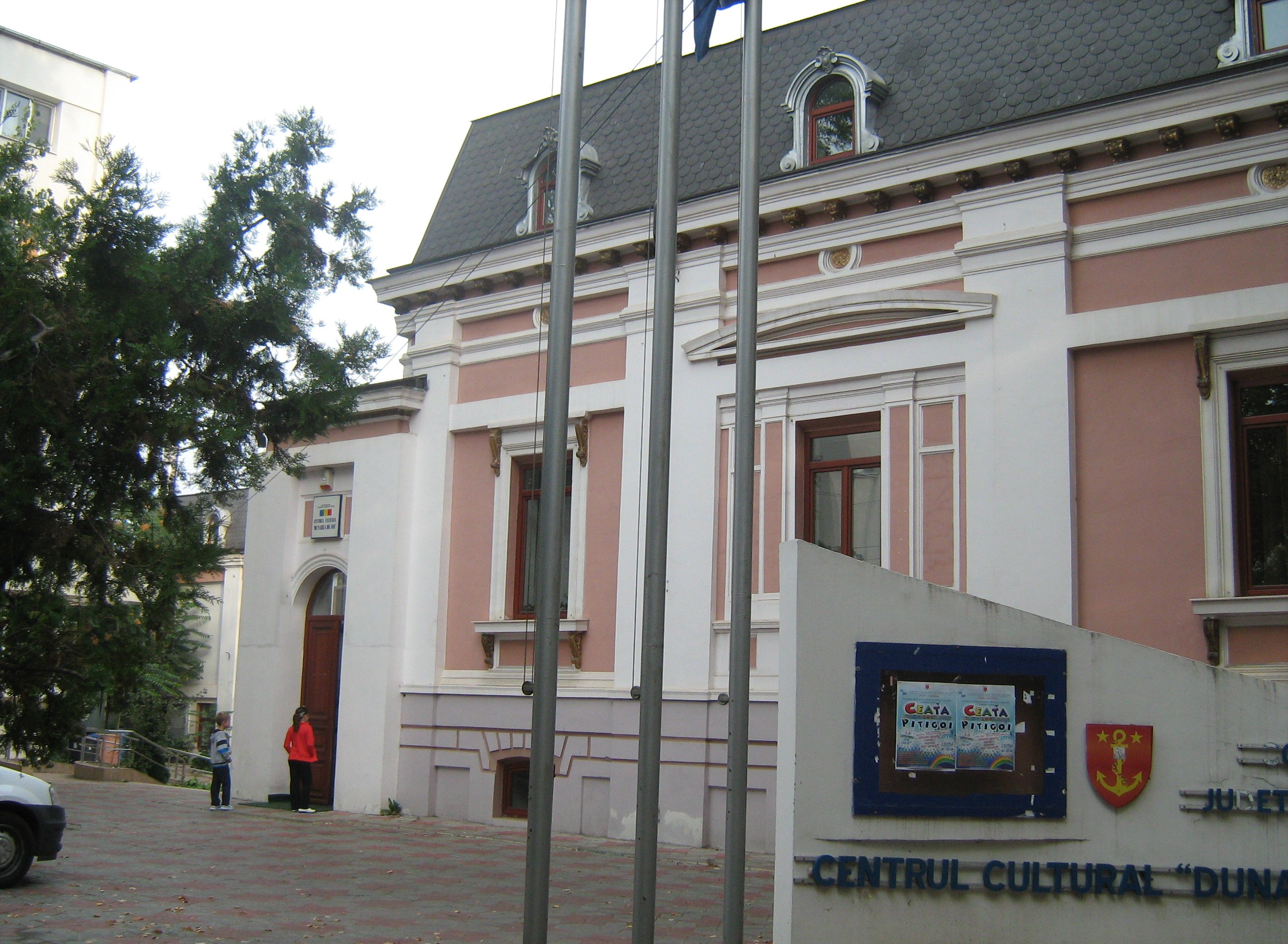 Galati, Casa Gheorghiade